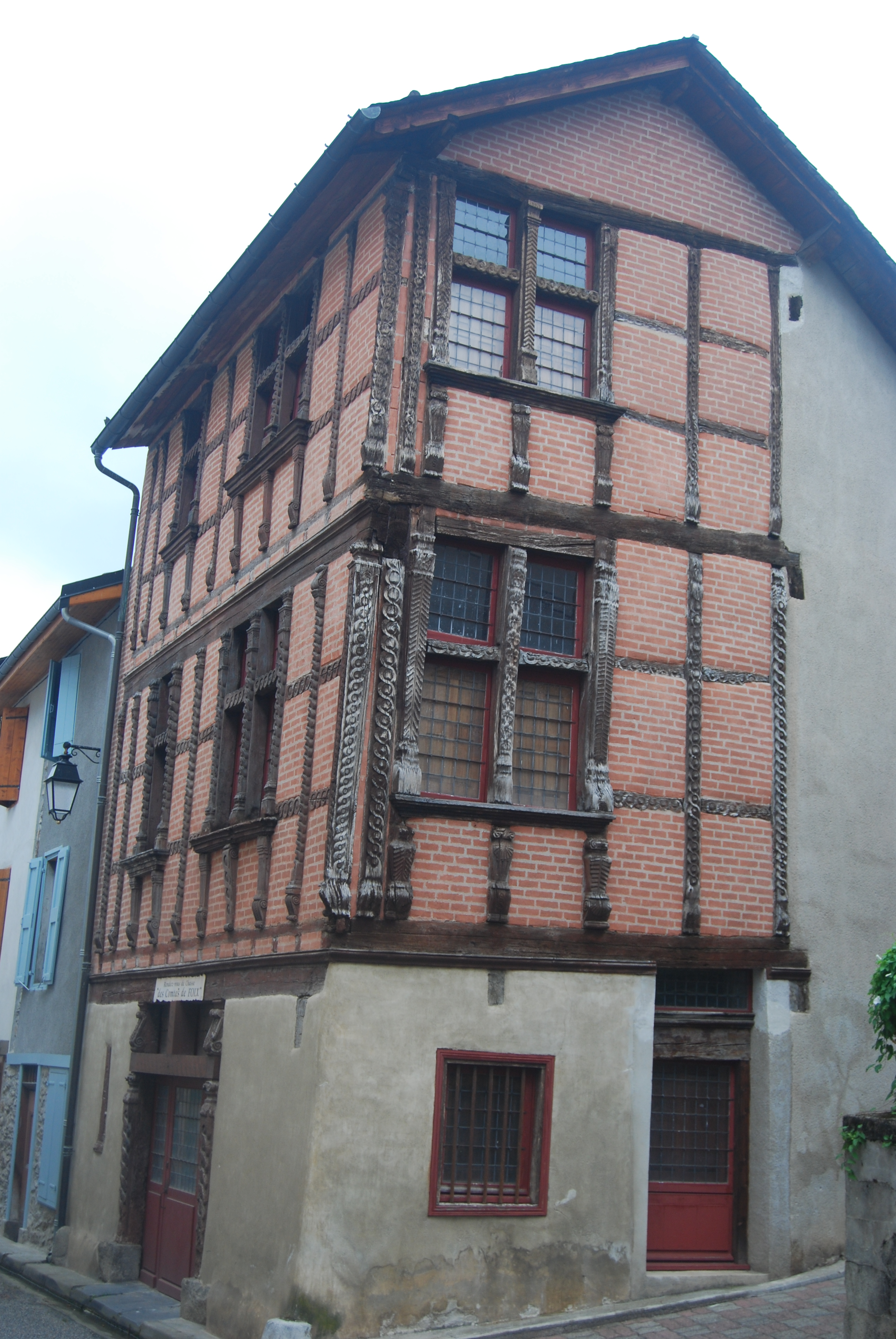 La bâtisse appelée « rendez-vous de chasse des comtes de Foix », Siguer, Ariège. .